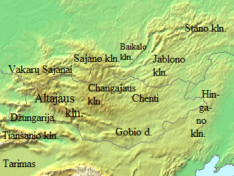 Topografie der Mongolei